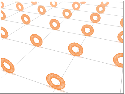 Zwei Dimensionen zu einem Torus aufgerollt an jedem Punkt der Raumzeit